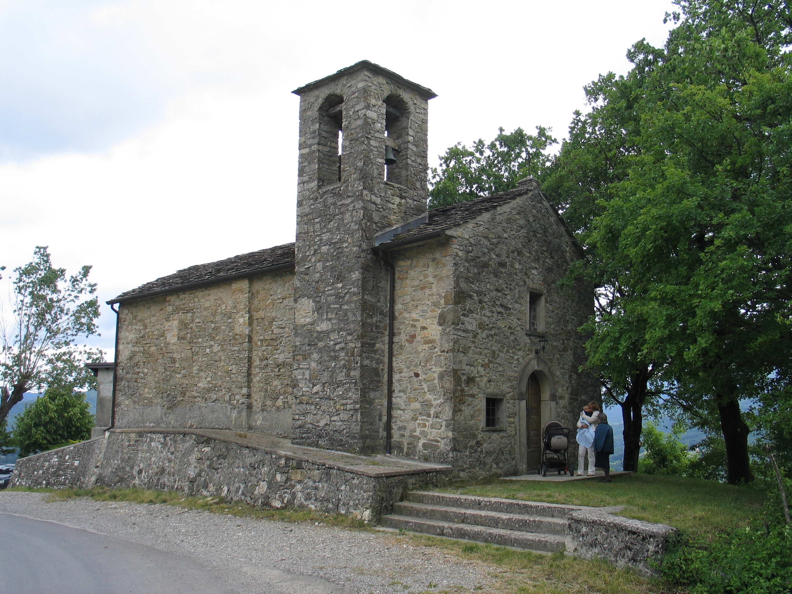 Chiesa di San Siro vicino a Bardi, Parma, Italia